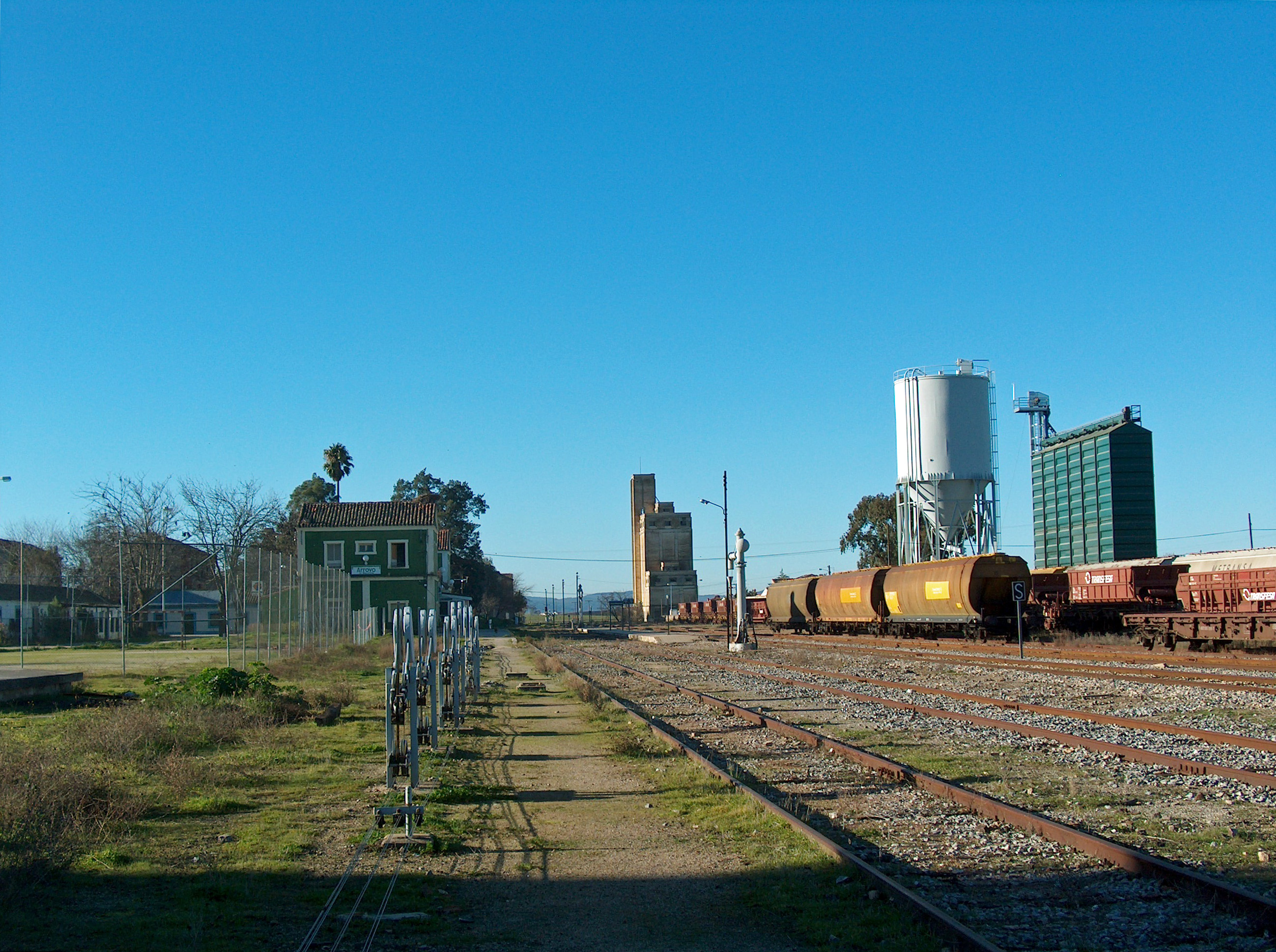 La estación de Arroyo-Malpartida. Pedanía del municipio de Cáceres